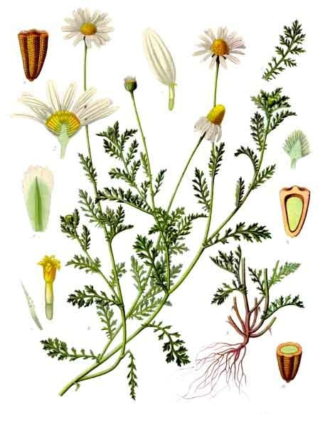 Acker-Hundskamille. A Wurzel und unterer Teil der Pflanze. B blühender Zweig. 1 Stengelblatt; 2 Körbchen im Längsschnitt; 3 Blatt des Hüllkelches; 4 Randblüte; 5 Scheibenblüte; 6 Spreublättchen; 7 Blütenboden mit Spreublättchen im Längsschnitt; 8 reifes Früchtchen; 9 dasselbe im Längsschnitt; 10 dasselbe im Querschnitt. A, B, 1 und 7 natürliche Grösse. 1—6 und 8—10 vergrössert.